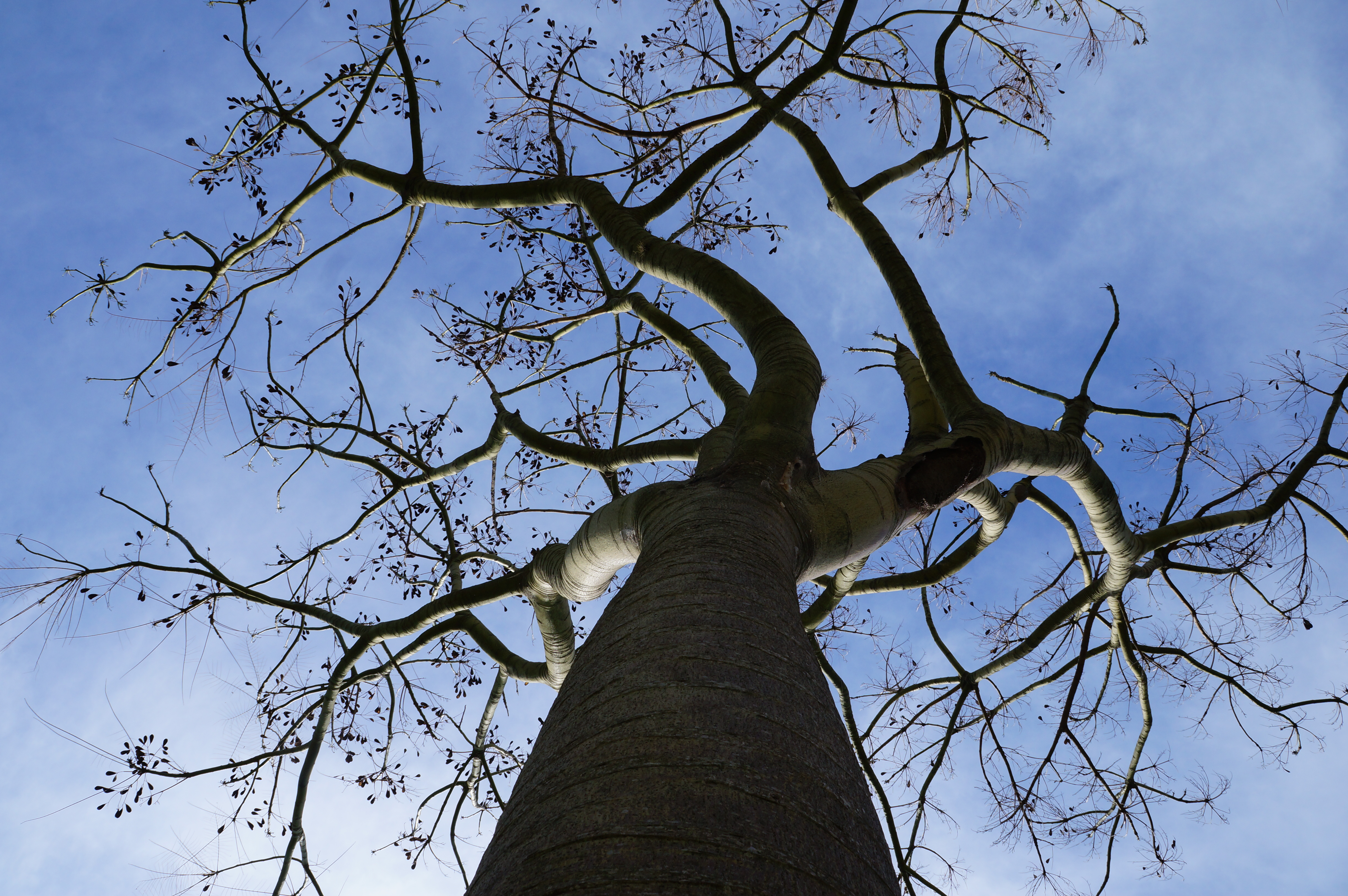 Imagem capturada a partir da base desta linda árvore, o Guapuruvú, desfolhada em razão do inverno.